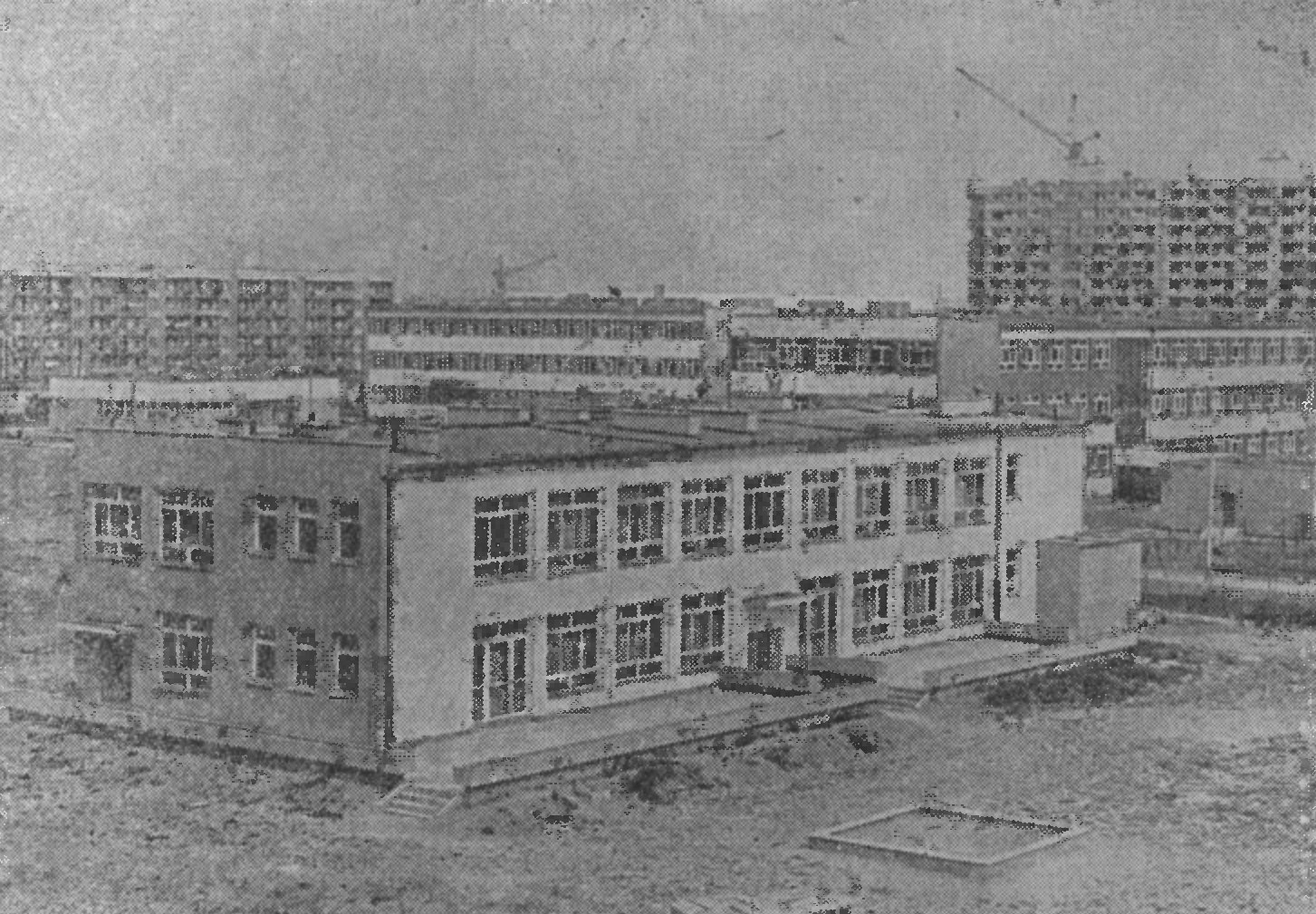 Os. Rzeczypospolitej. Przedszkole - poł. września 1974